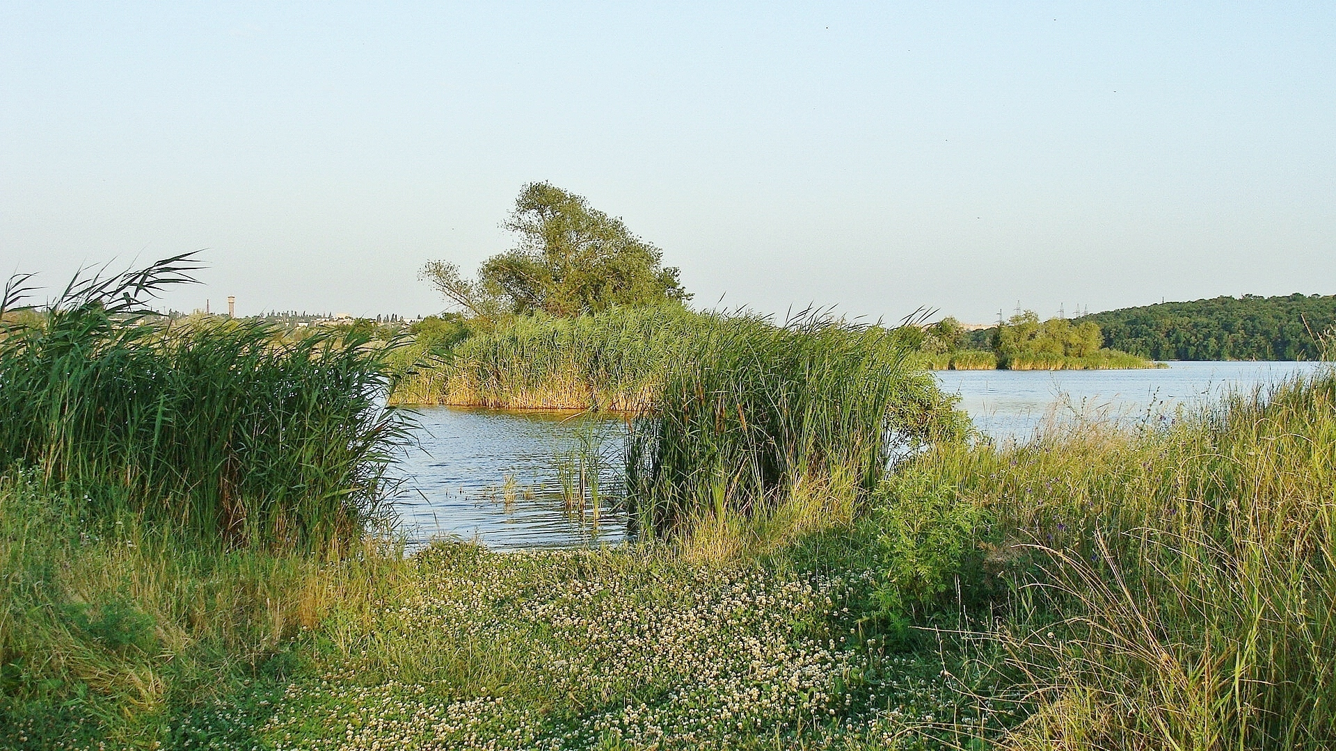 Растительный мир Зуевского водохранилища.